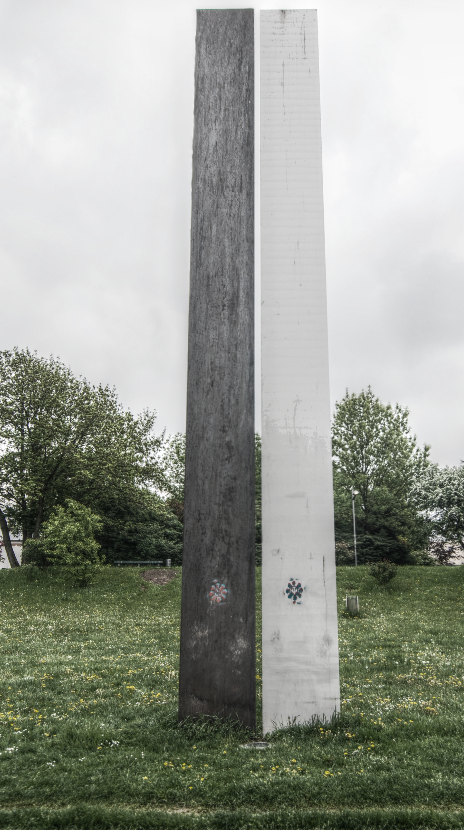 Forum Metall: Thermocouple